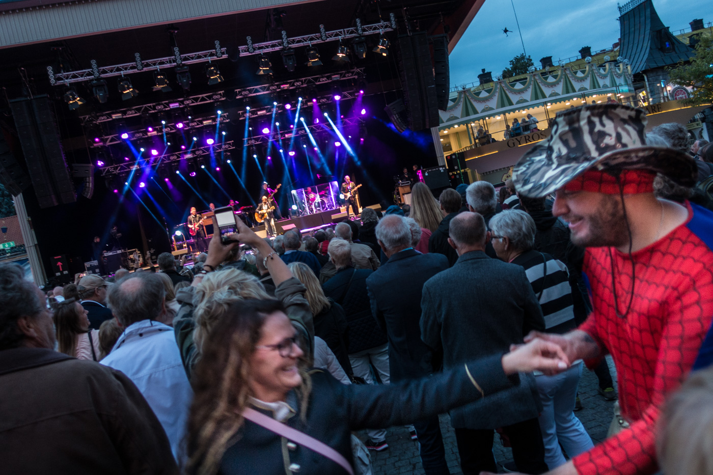 Sven-Ingvars uppträder inför en fulltalig publik på Gröna Lund i Stockholm den 12 augusti 2016.